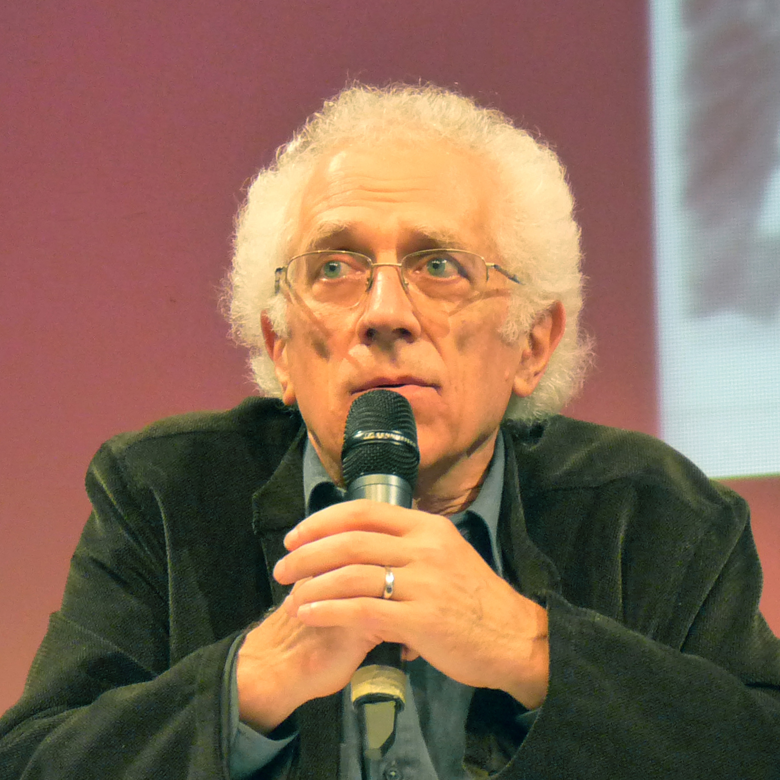 Rencontre avec Tzvetan Todorov (en compagnie d'Antoine Audouard et Anouk Grinberg) autour de ses derniers ouvrages, Georges Jeanclos, Goya à l'ombre des Lumières et L'Expérience totalitaire. La signature humaine (2011), dans le cadre de la semaine littéraire Bibliothèques idéales (Aubette, Strasbourg)